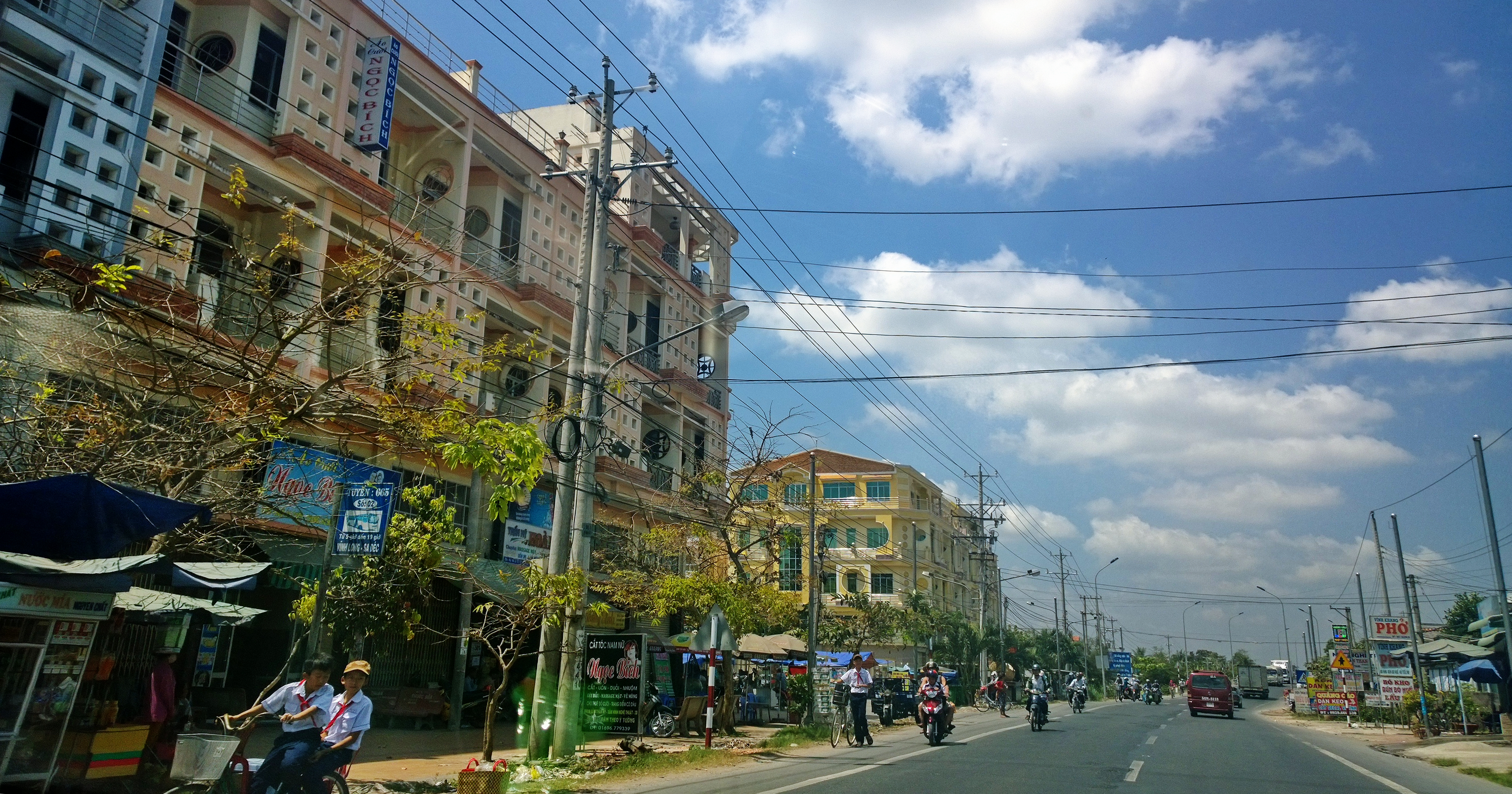 quoc lo 80-Tân Nhuận Đông, Châu Thành, Đồng Tháp, Việt Nam